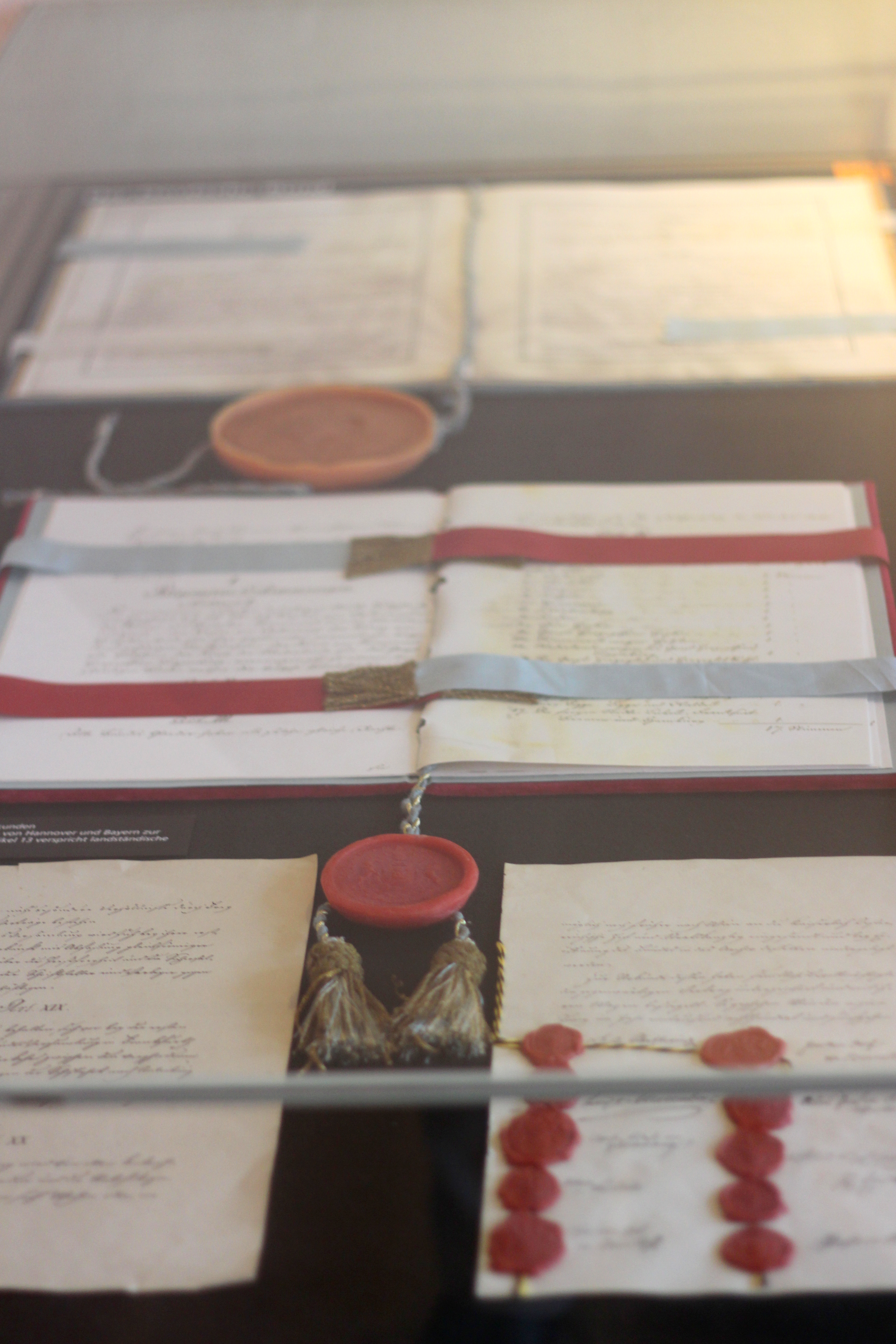 Erinnerungsstätte für die Freiheitsbewegungen in der deutschen Geschichte. Bundesakte.